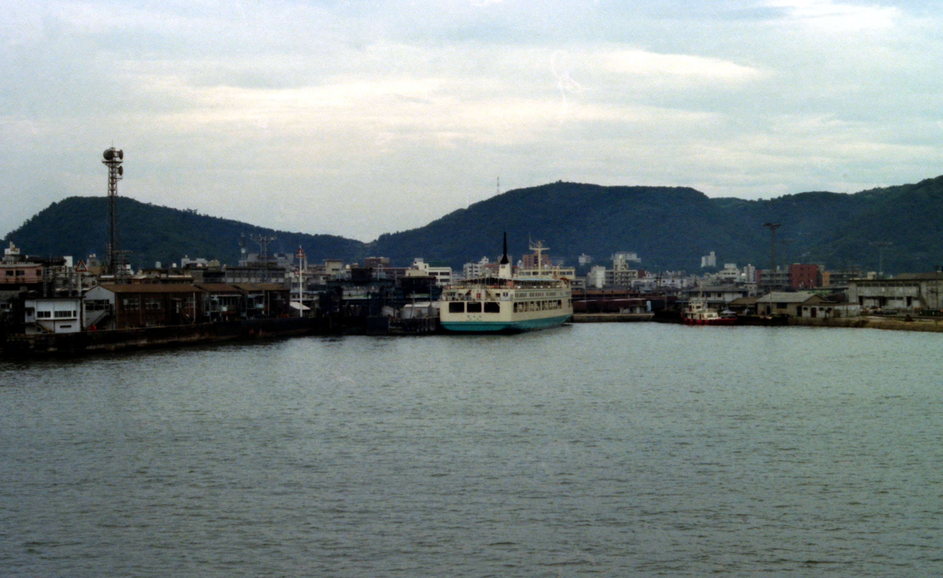 国鉄 宇高連絡船より 高松港を望む Ｓ５６－８－１２